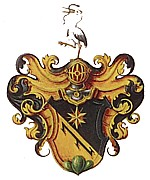 Schrägrechts geteilt von Schwarz sechsstrahliger goldener Stern, und von Gold auf grünem Dreiberg schwarze Säge.